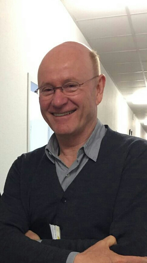 Prof. Dr. Reiner Lehberger